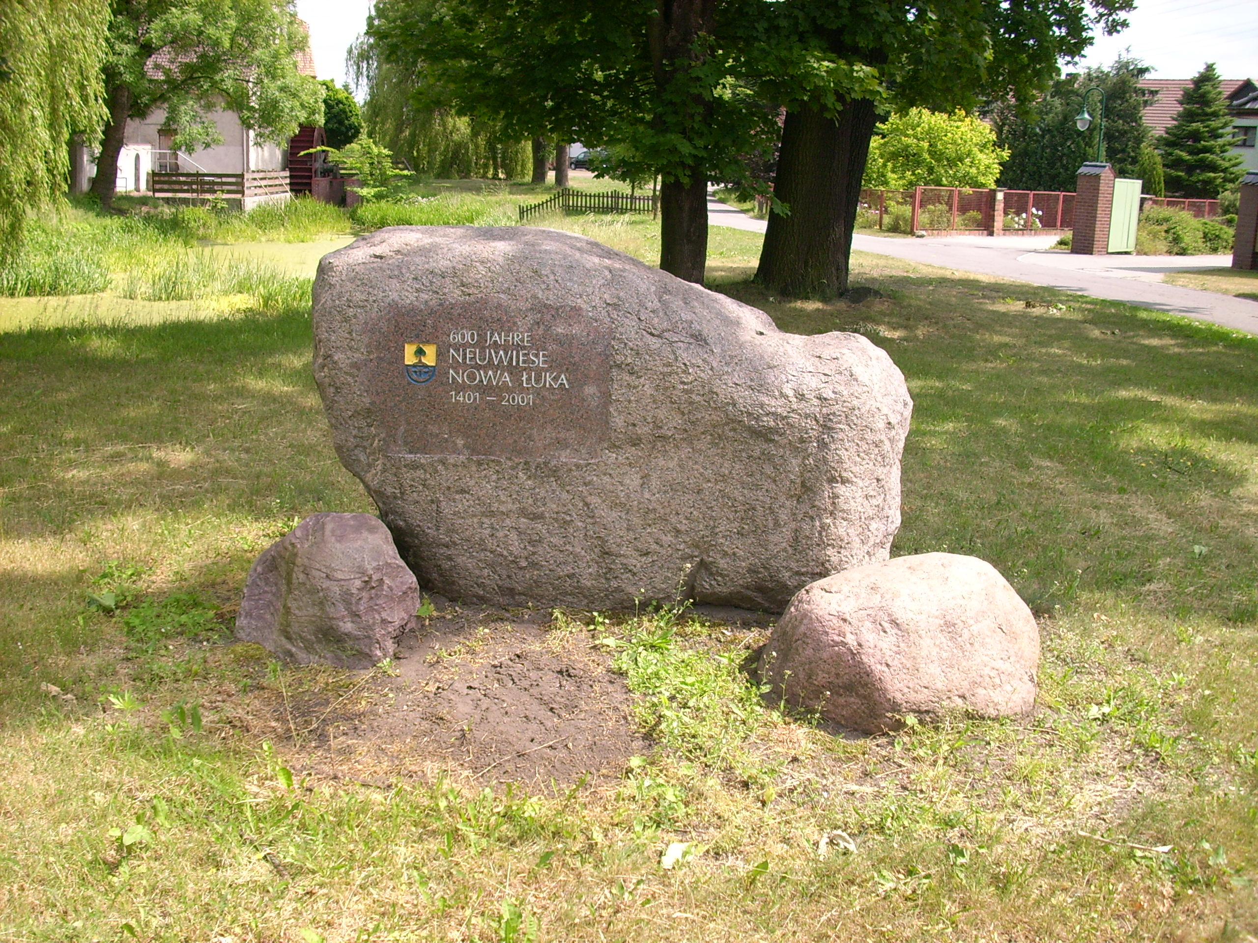 Gedenkstein zur 600-Jahrfeier in Neuwiese (Elsterheide) Hornjoserbsce: Wopomnjenski kamjeń składnostnje 600-lětneho wobstaća Noweje Łuki